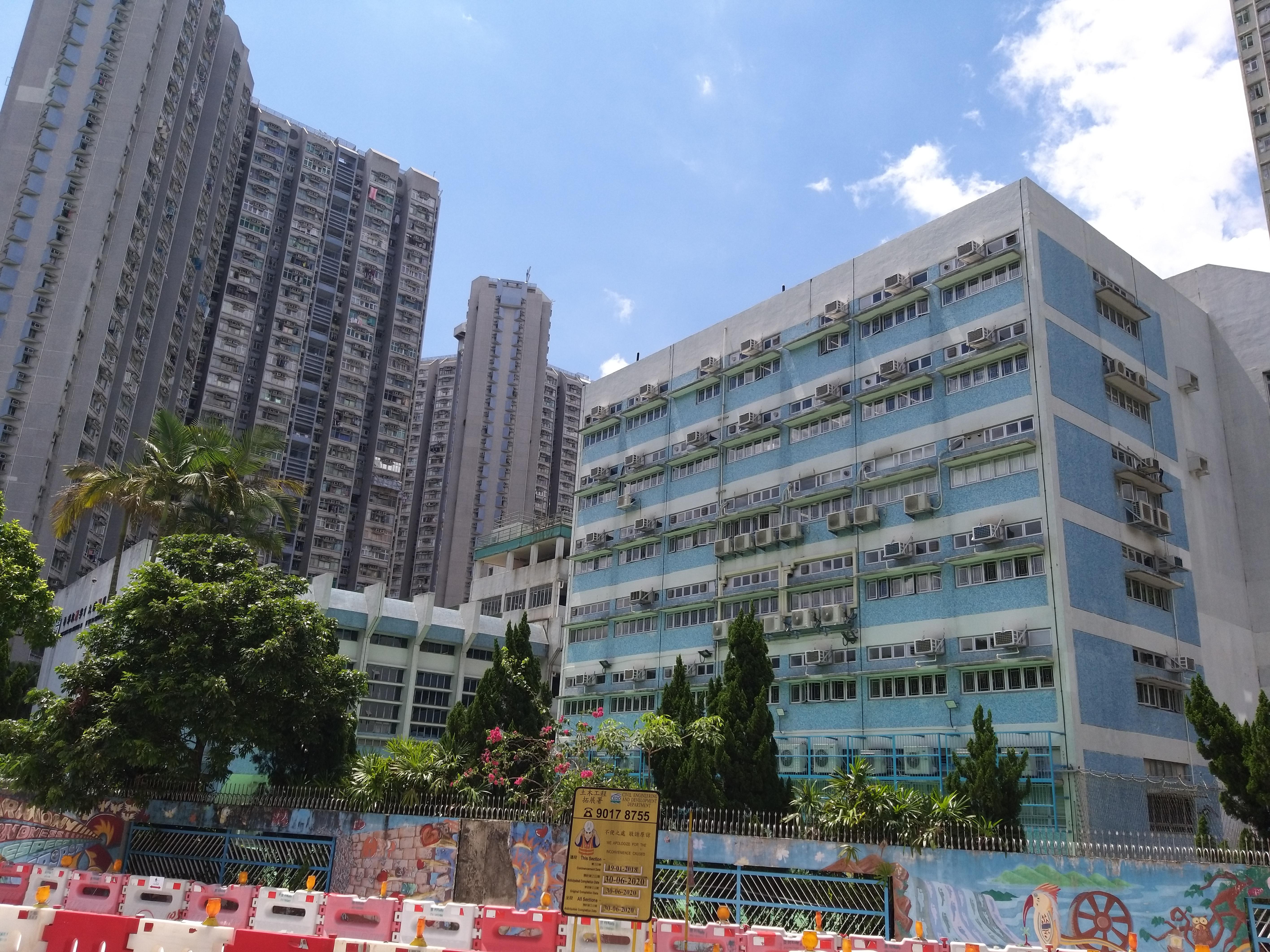 位於富亨邨的大埔卍慈中學校舍